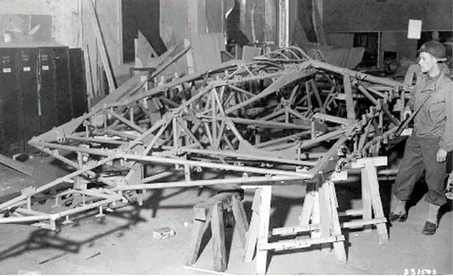 Horten Ho 9 (Go 229) Prototyp V-5 wurde am 14.04.1945 vom VIII. Corps der 3. US-Army in Friedrichroda/Thüringen, kurz vor ihrer Vollendung erobert. Die V-5 wurde mit der Beutenummer T2-490 per Schiff in die USA gebracht